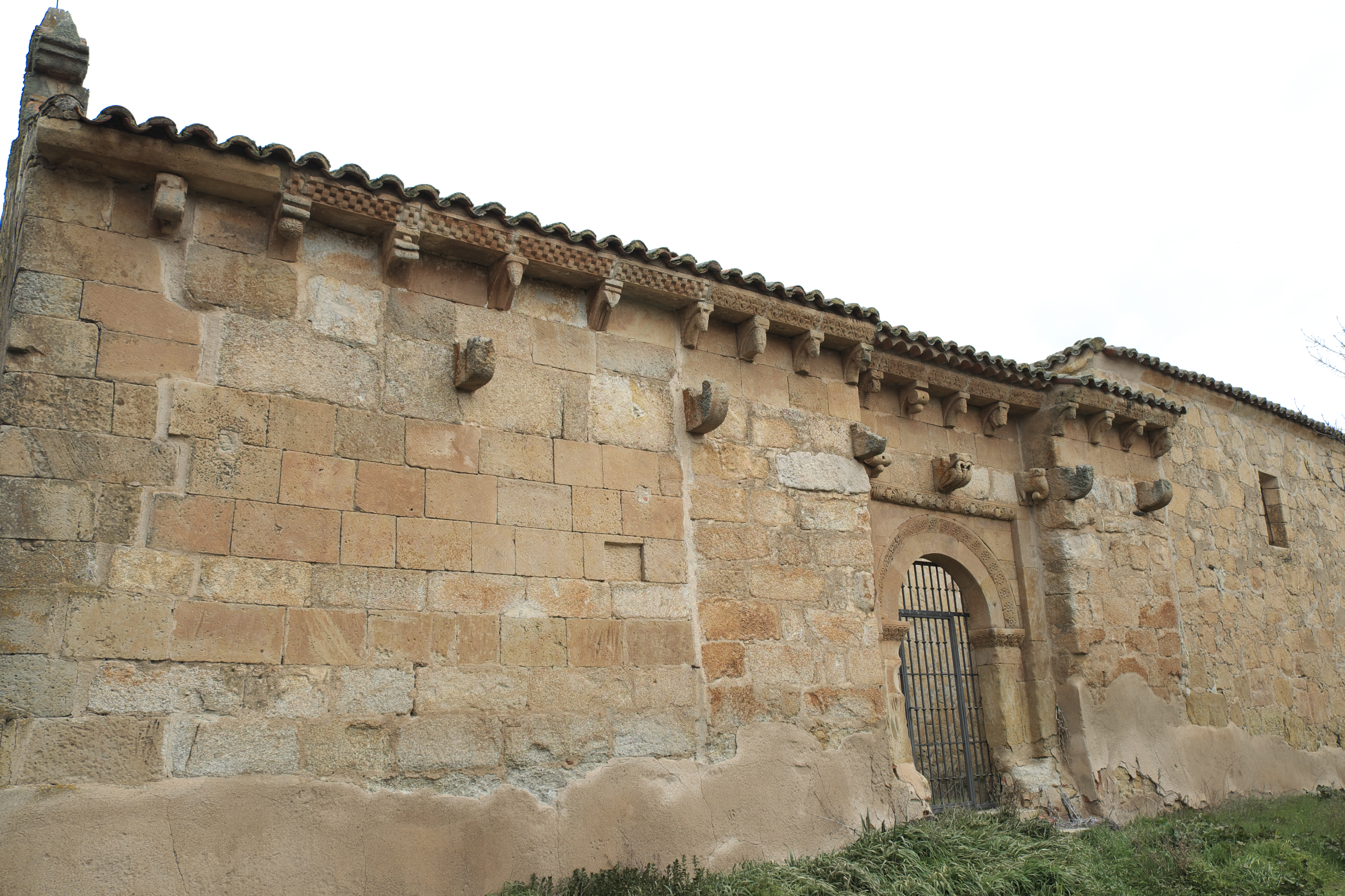 Kirche San Juan in Santibáñez del Río bei Salamanca (Kastilien-León/Spanien), Ansicht von Südwesten